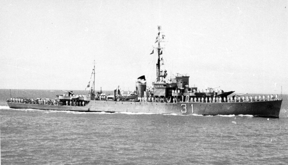 Fragata ARA Hércules (P-31) en mar